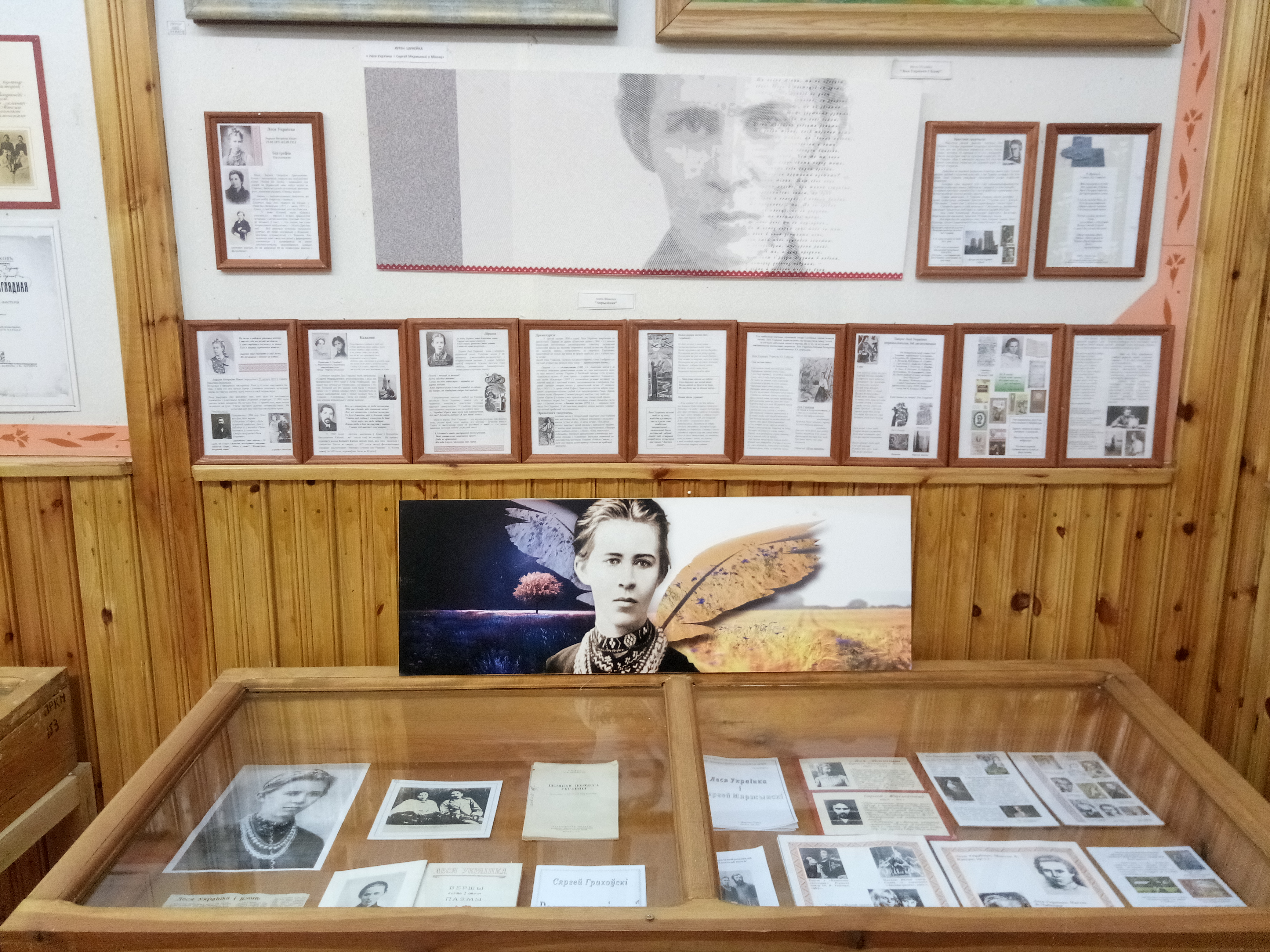 Экспазіцыя музея.